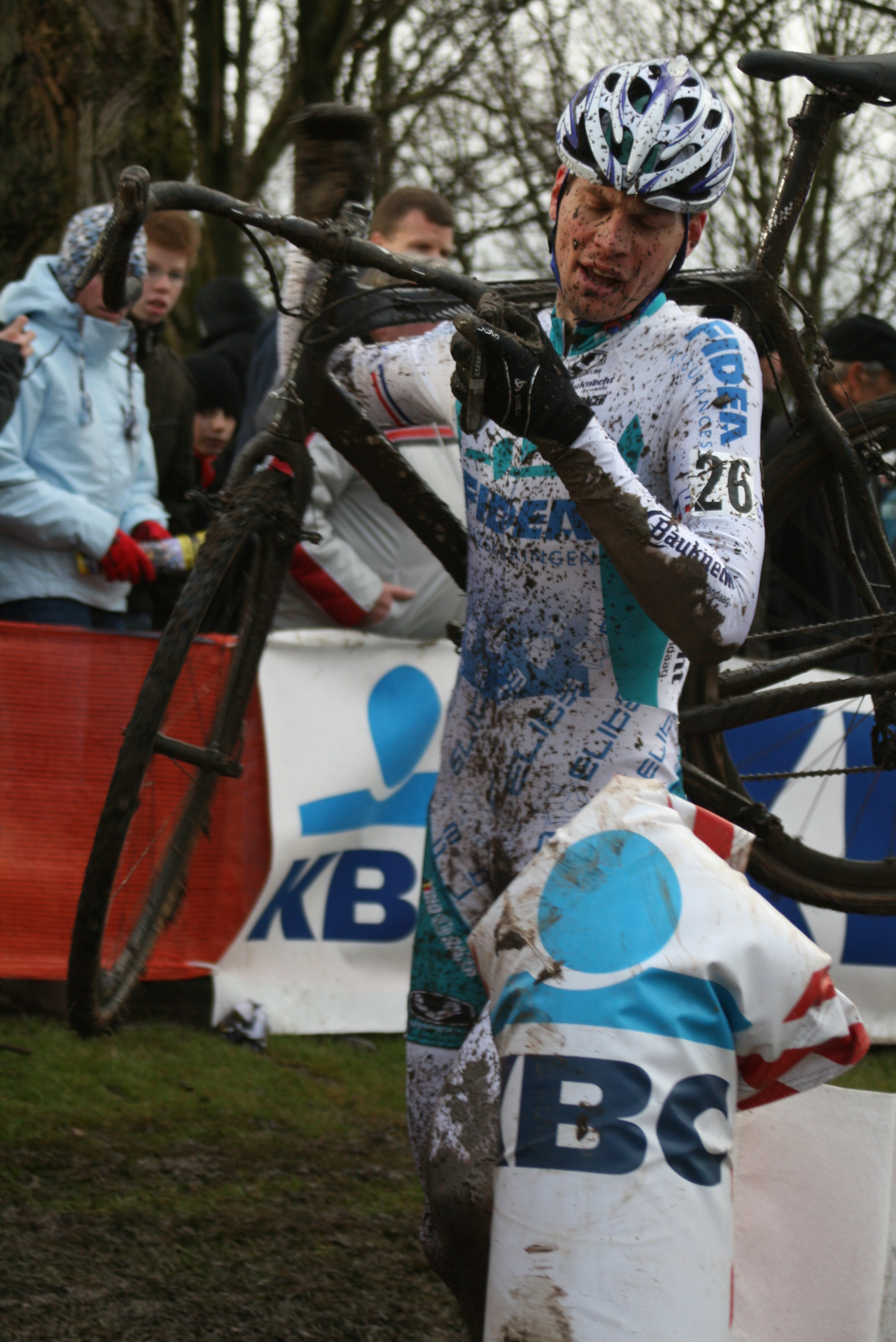 Petr Dlask au Grand Prix Lille Métropole 2009